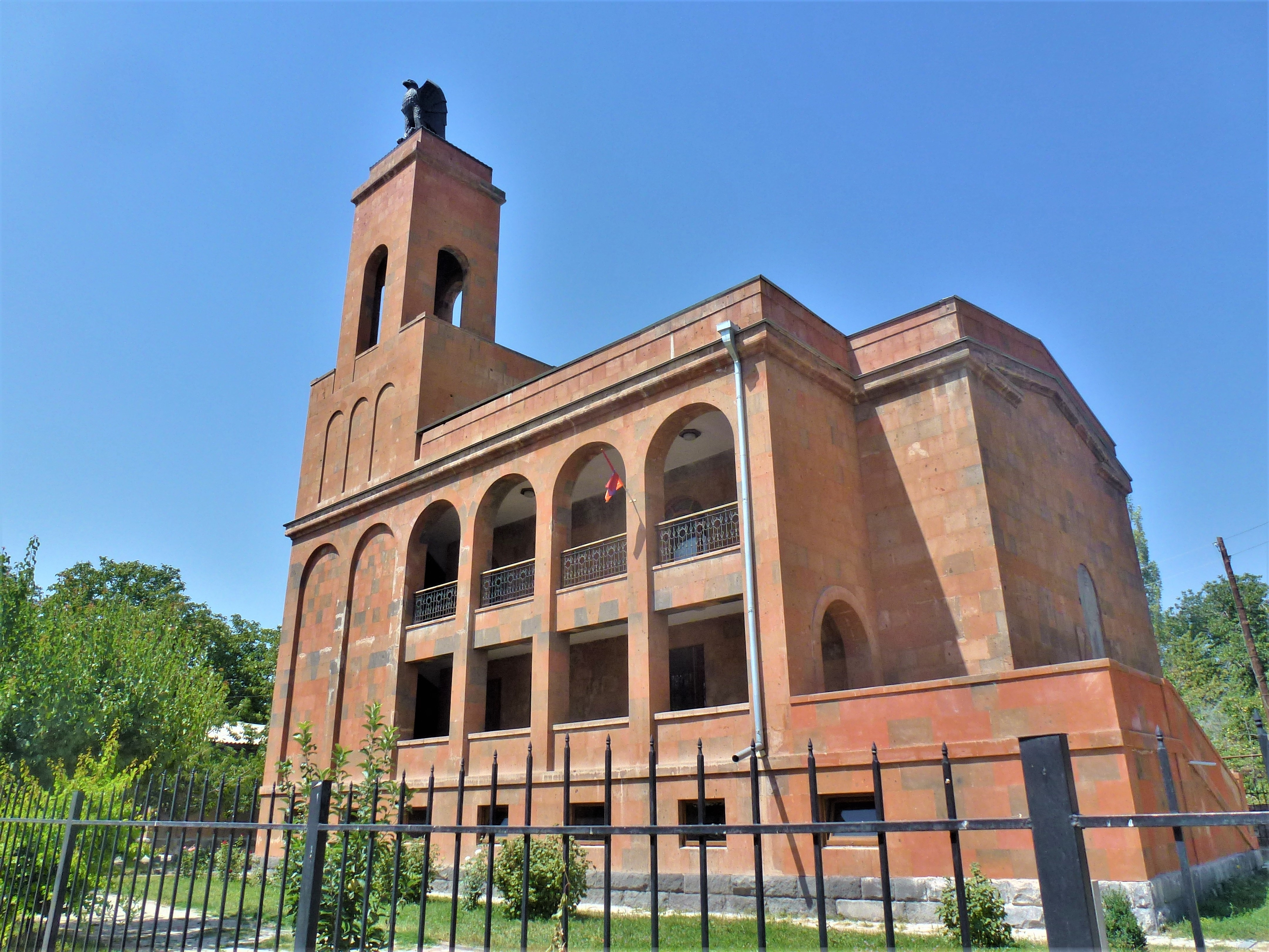 Գևորգ Չաուշի թանգարան, Աշնակ, Հայաստան 11/13